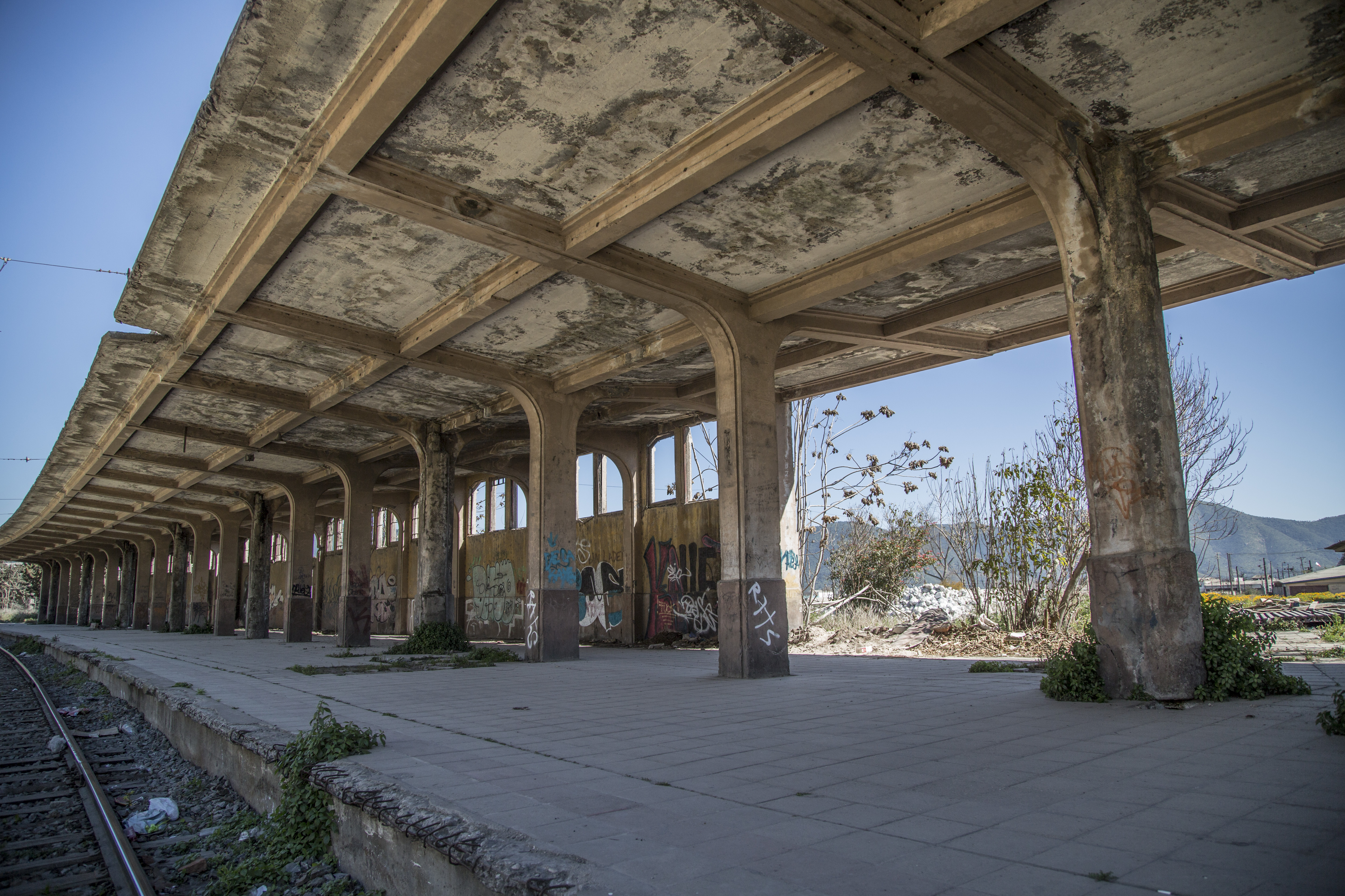 Antigua Estación Calera, Chile.